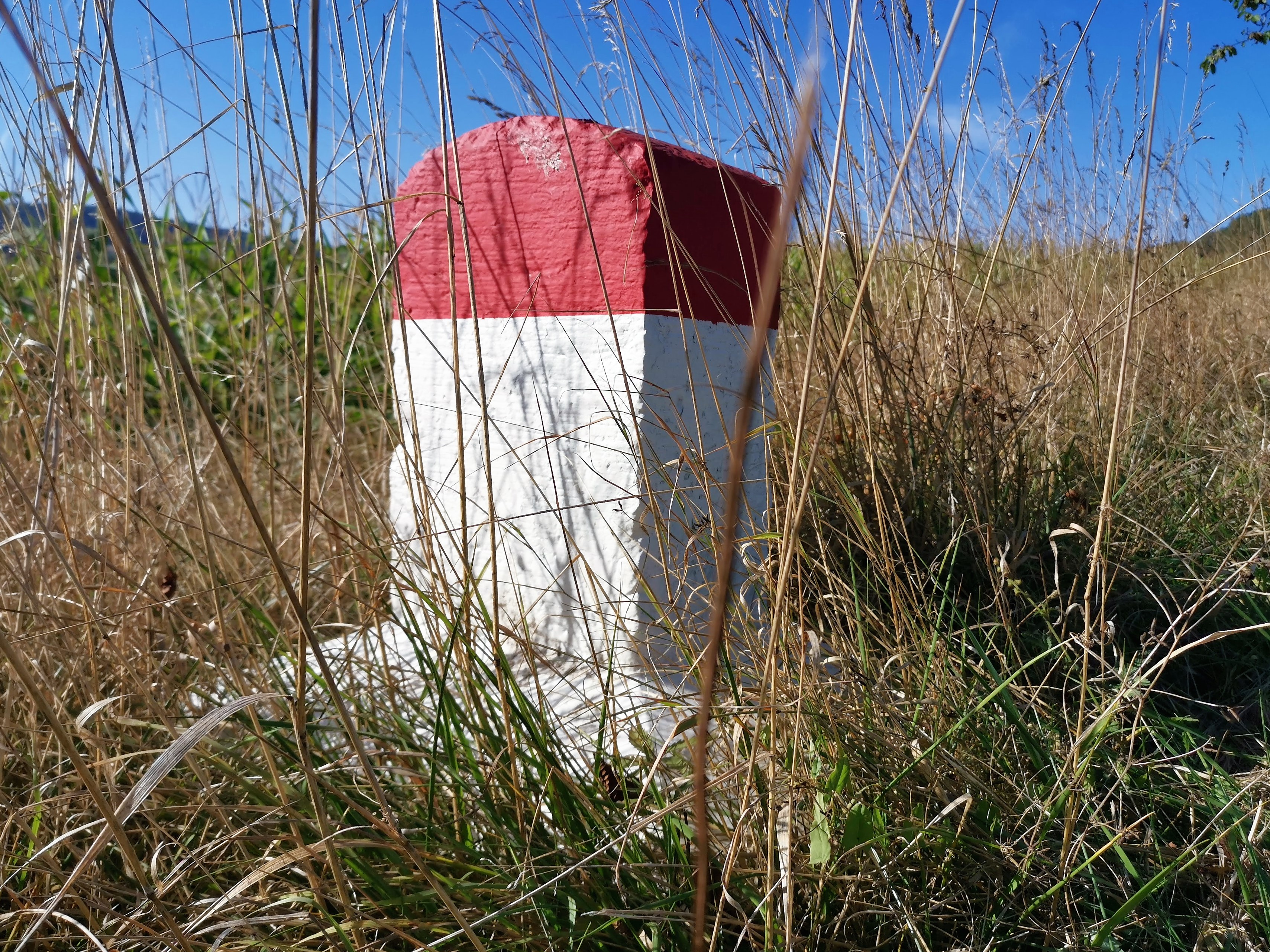 Borne kilométrique sans indication sur la N17B à Bettel.